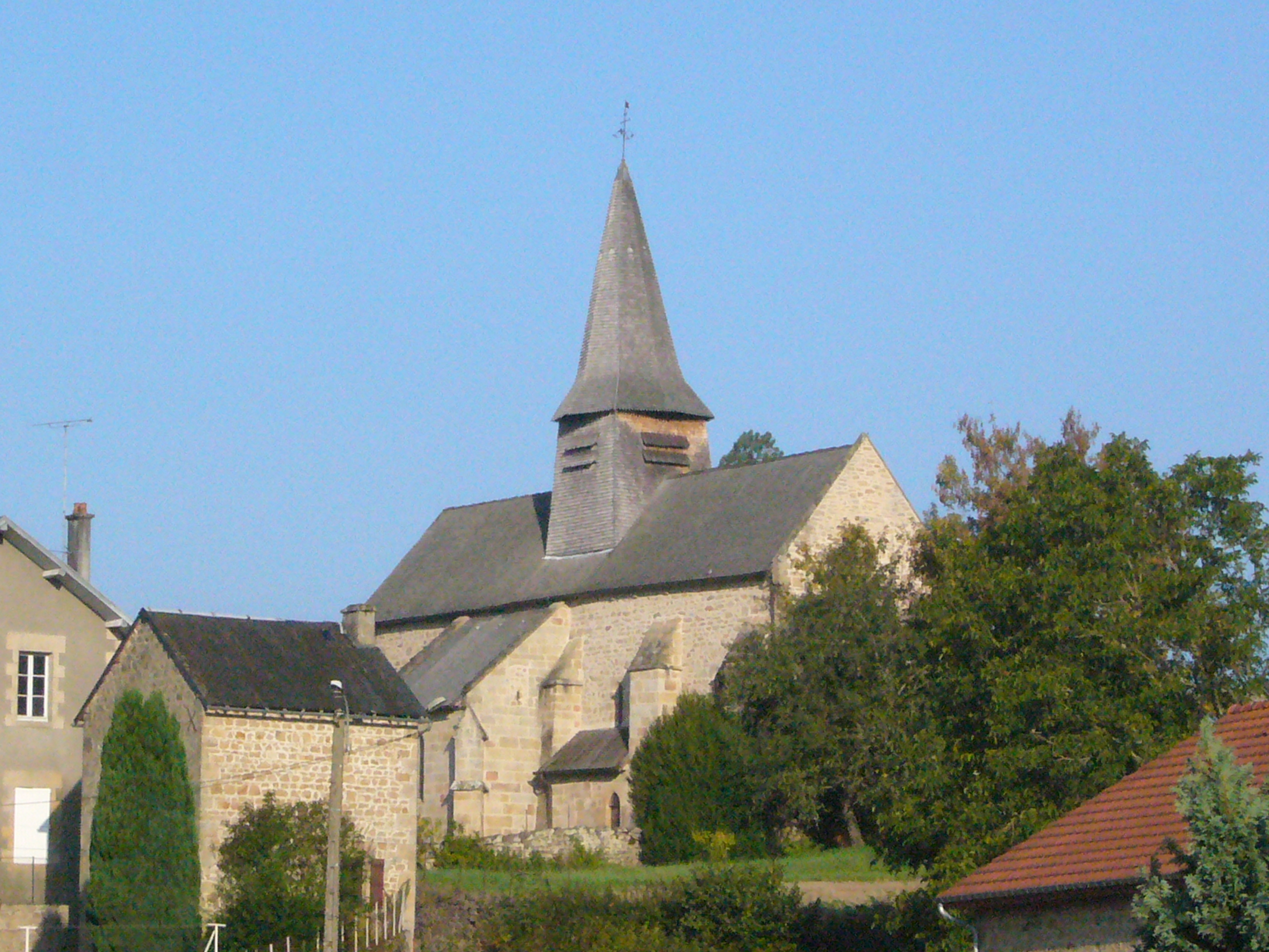 Église de Nedde, Haute-Vienne, France